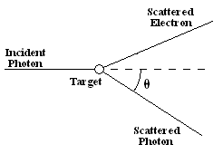 A simple diagram of compton scattering.